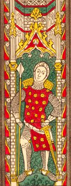 William la Zouche, 1st Baron Zouche of Mortimer